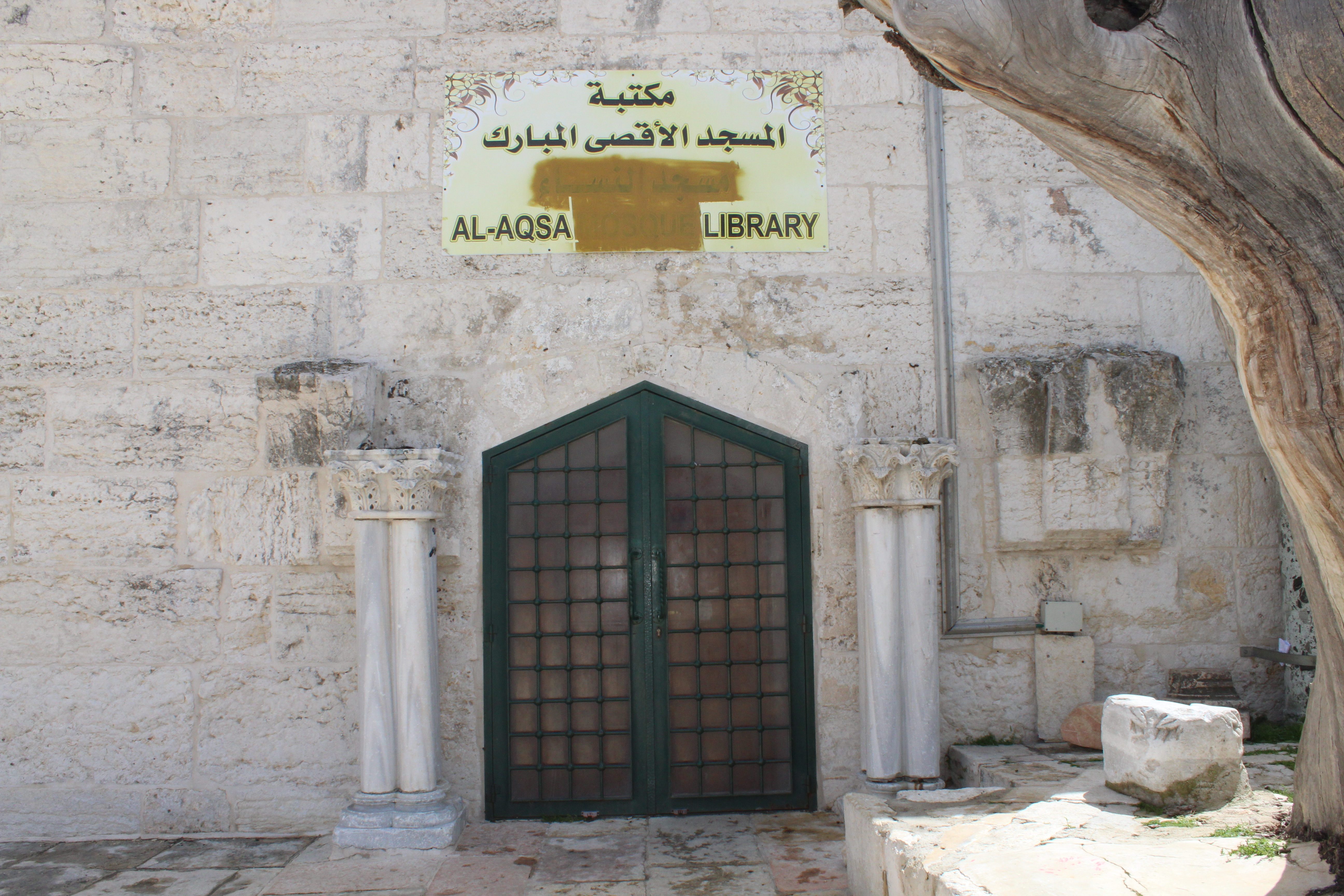 ספריית מסגד אל-אקצא